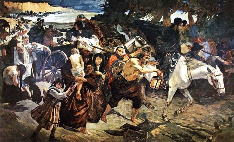 Éxodo de Caracas en 1814.